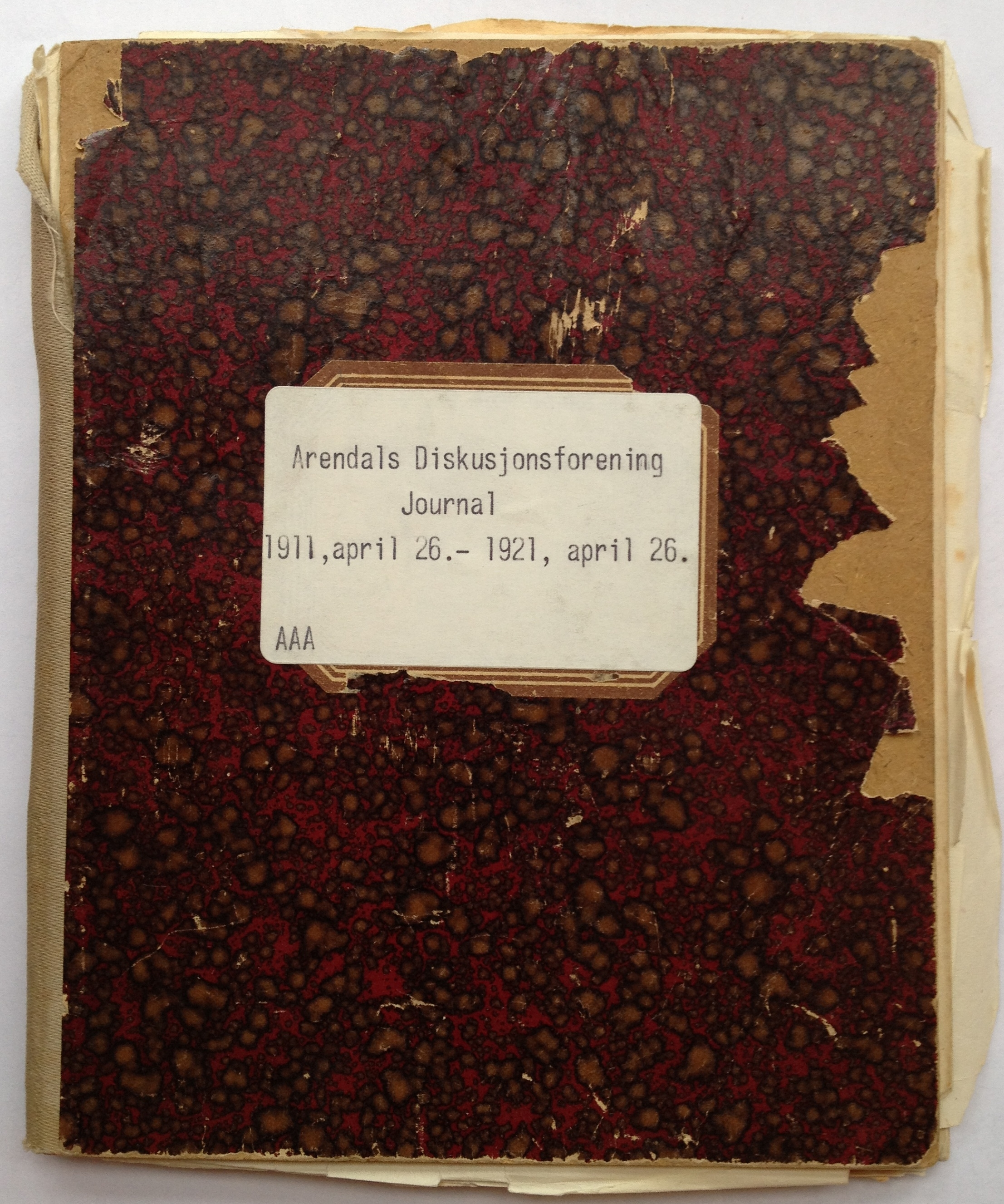 Bilde av forsiden til den første møteboken til Arendal Diskusjonsforening